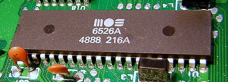 CIA MOS 6526A Plastikgehäuse